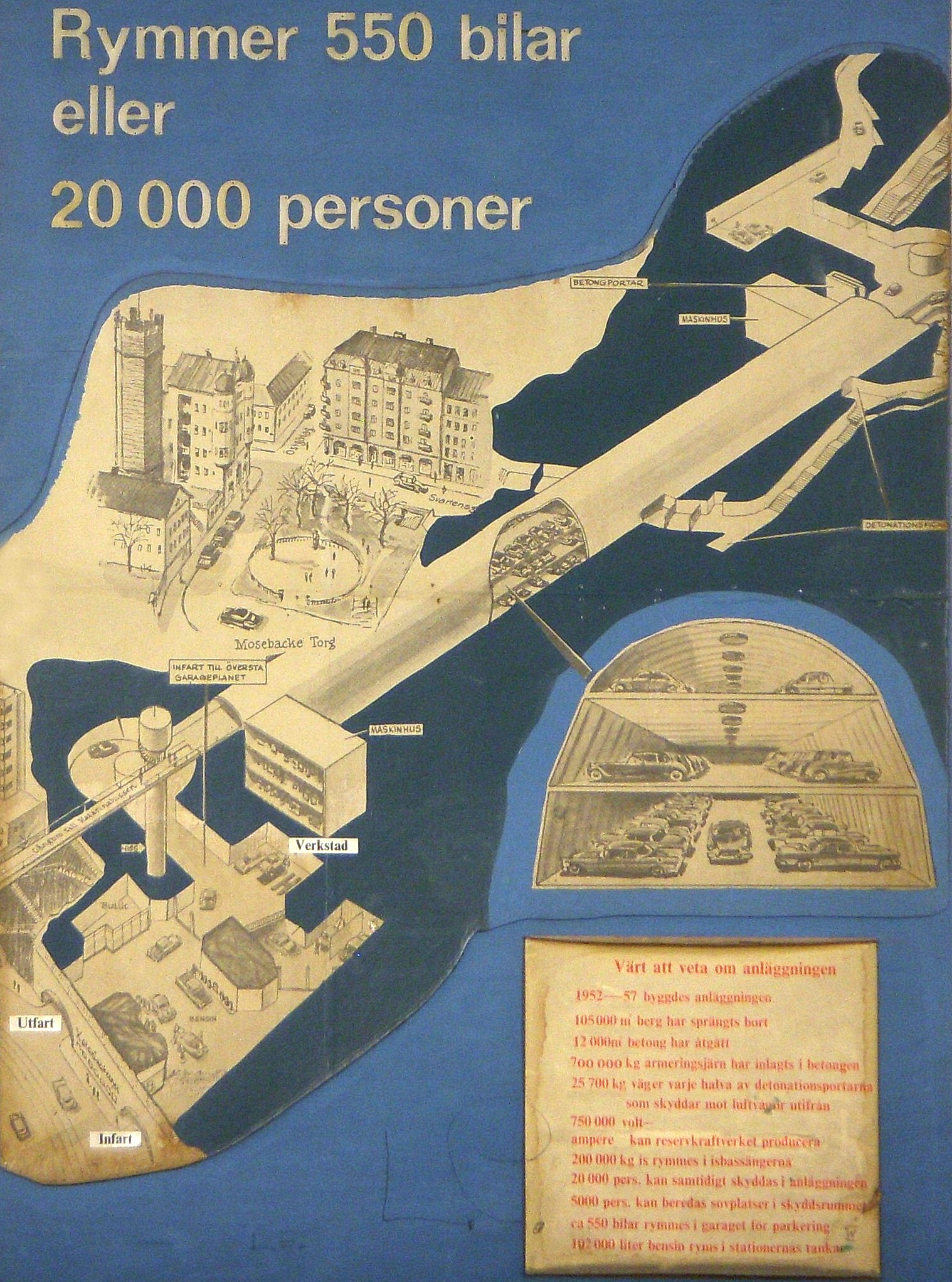 Katarinabergets skyddsrum, sprängskiss